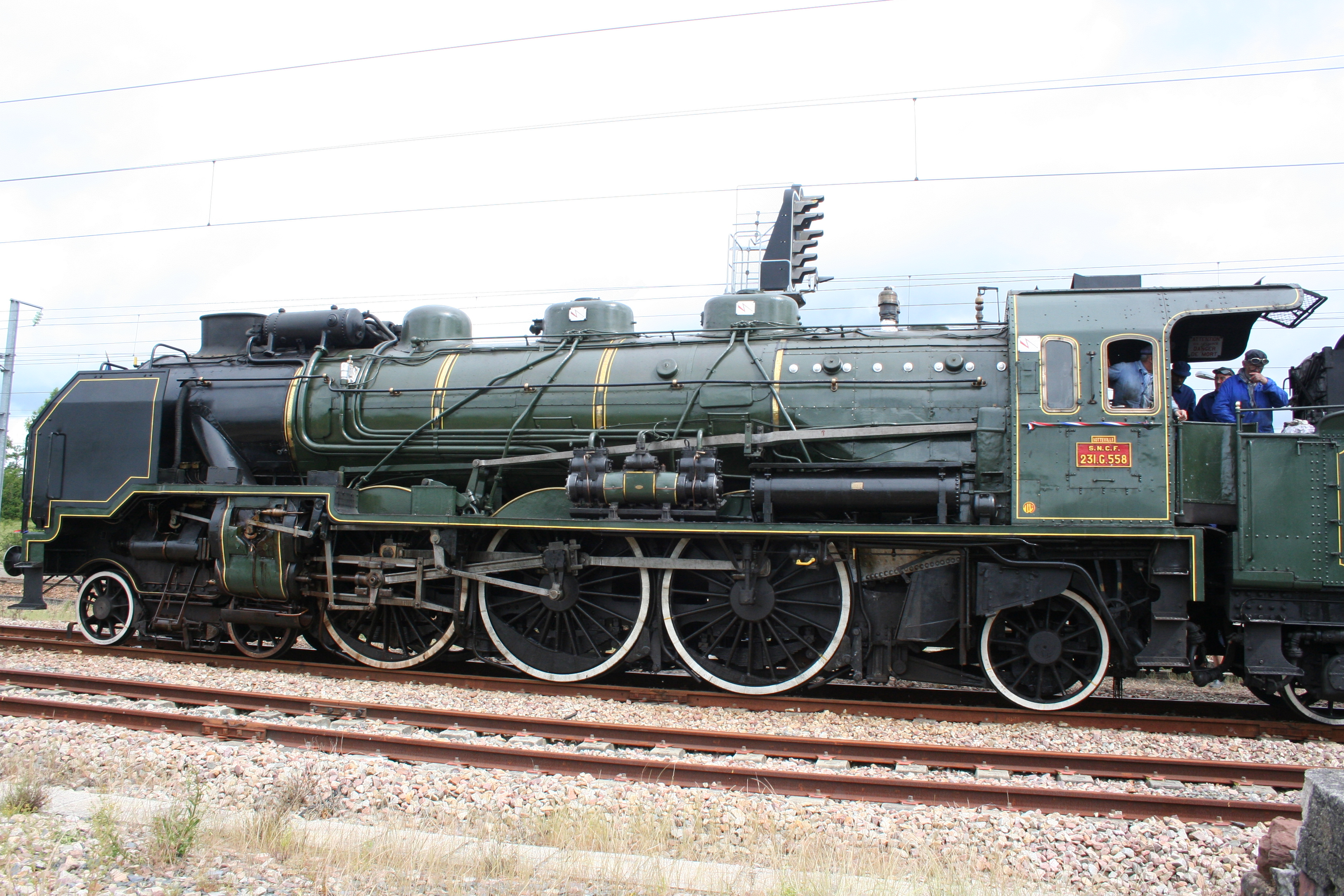 Train de la liberté lors du 65e anniversaire du débarquement du 7 juin 2009 en gare de Lison. Le train est la Pacific 231 G 558 qui effectuait un trajet Lisieux à Lison